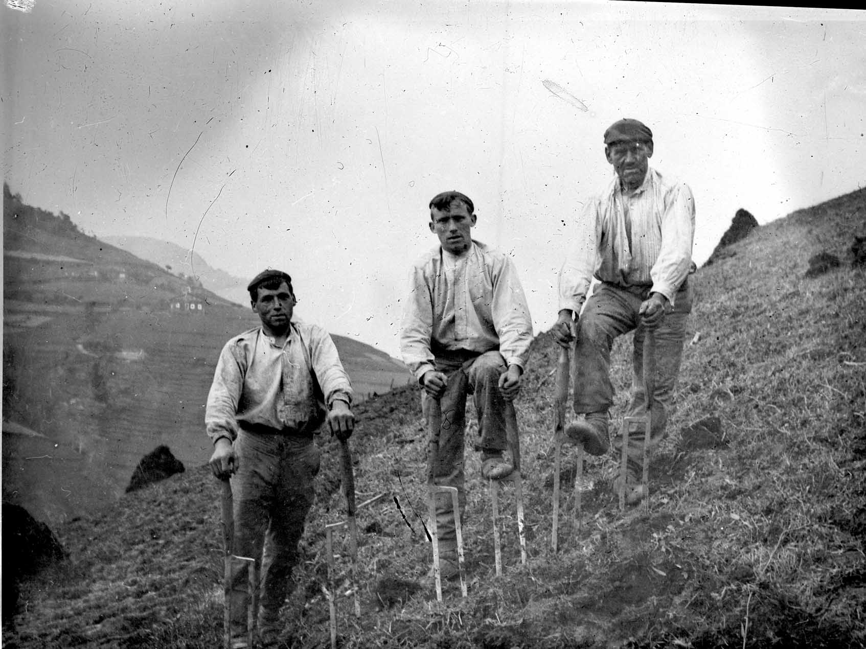 Baserritarrak laiatzen. Urtea eta kokapena ezezagunak zaizkigu. Kaso egin argazkian agertzen direnak beste argazki honetan ere agertzen direla: File:07 laiatzen.jpg